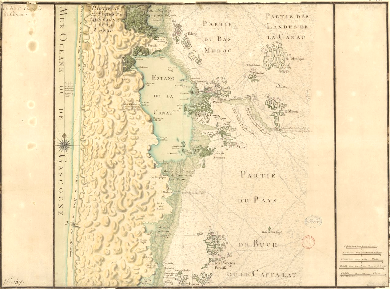 Claude Masse, Étang et forêt de Lacanau (1700-1724) : Bibliothèque nationale de France, département Cartes et plans, GE DD-2987 (1493 B) - mis en ligne le 31/07/2013.